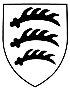 Divisionsabzeichen der 25. Infanterie-Division der Wehrmacht